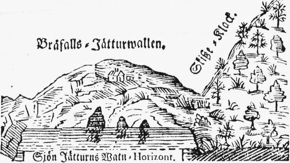 Jätturnvallen och Jätturnkyrkan